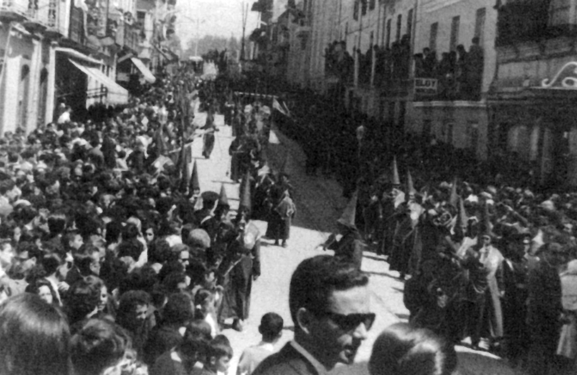 Antecedentes de la Banda de Cabecera